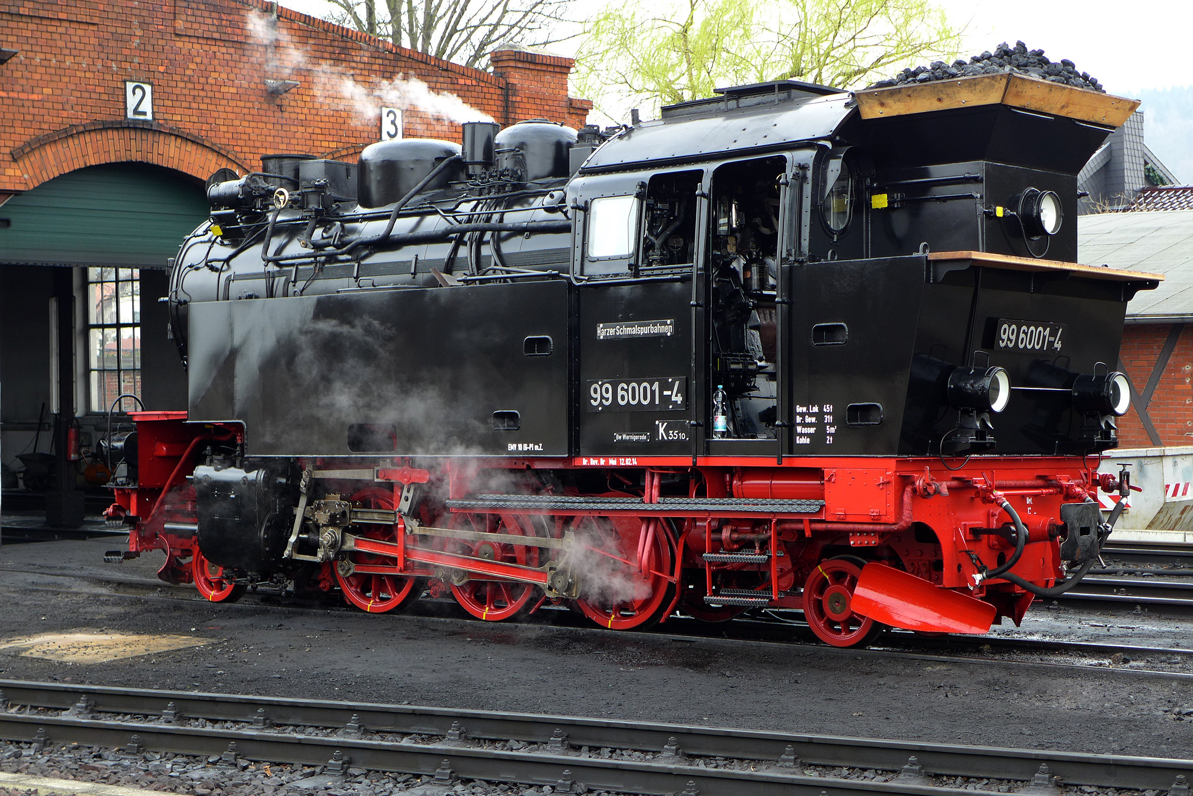 Dampflok der Selketalbahn im Bahnhof Gernrode